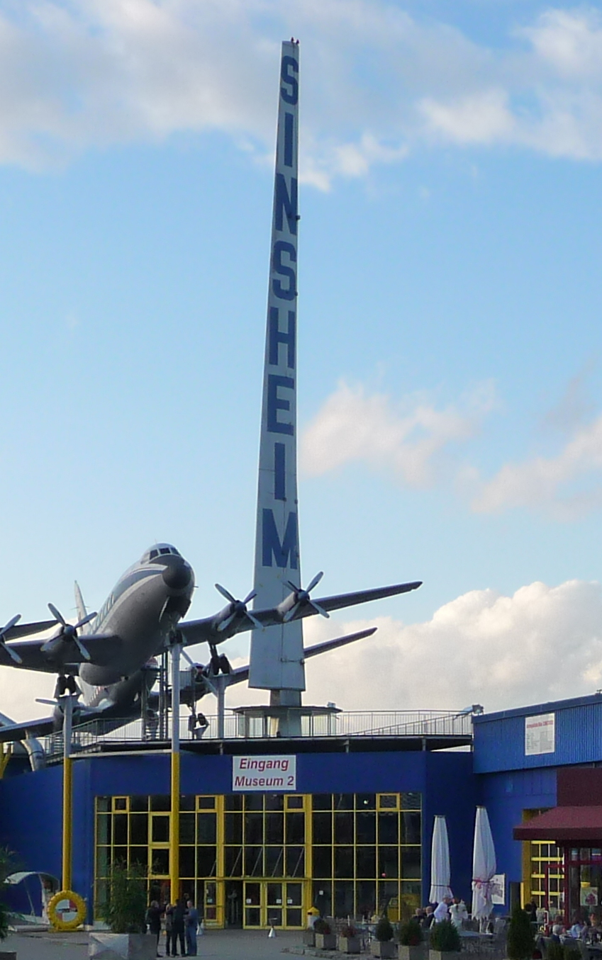 Auto- und Technikmuseum Sinsheim (Rhein-Neckar-Kreis, Baden-Württemberg, Deutschland); Growian-Rotorblatt